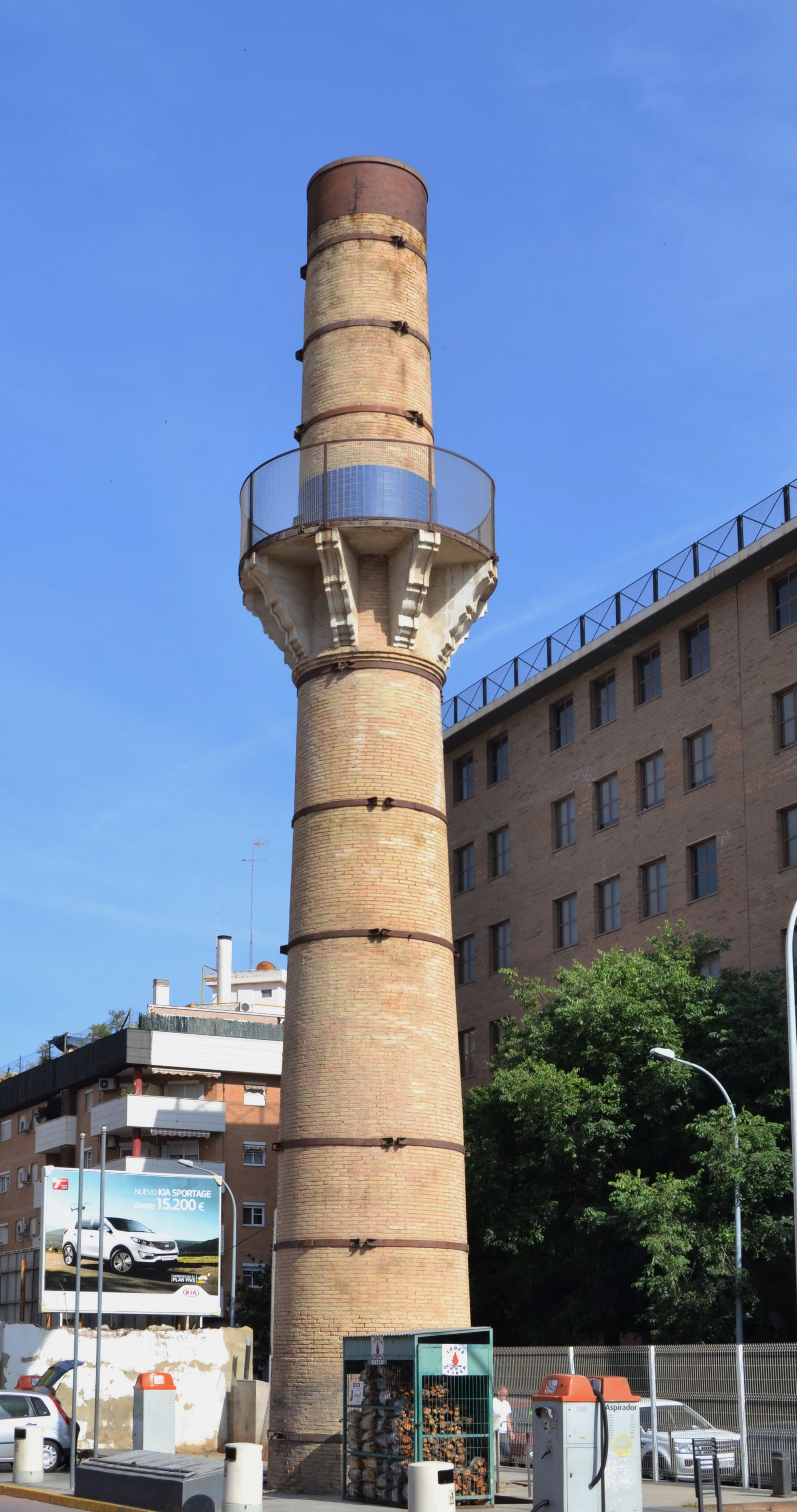 Carrer de la Serradora de València, xemeneia.